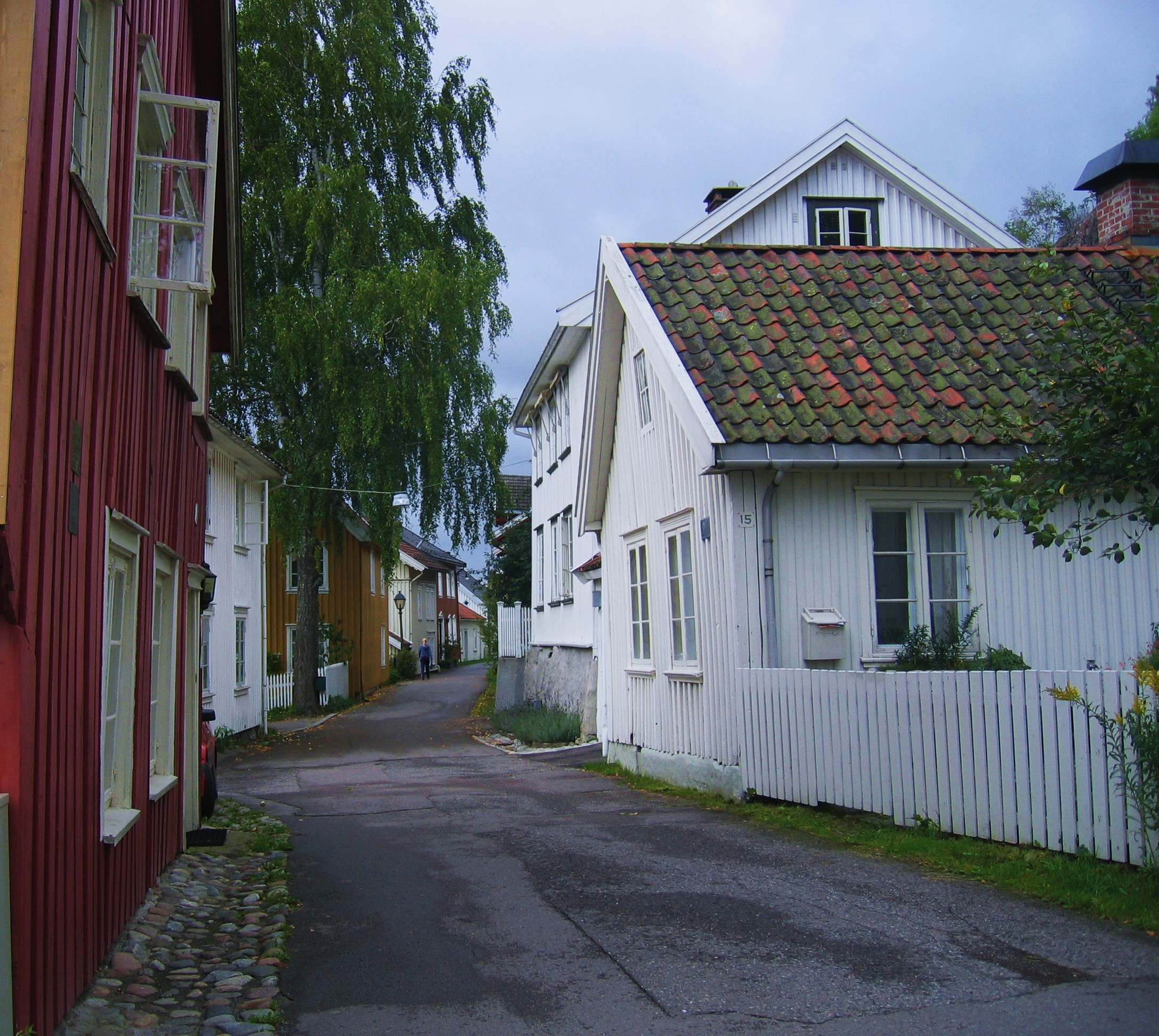 Tønsberg, Nordbyen, old wooden buildings